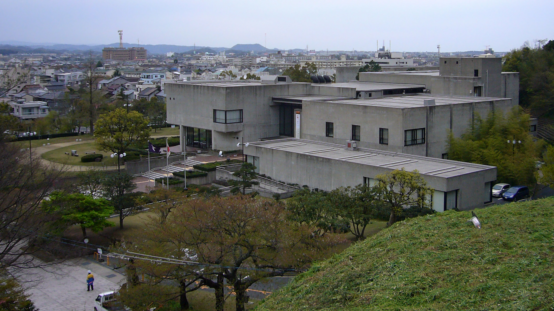 Tottori Prefectural Museum in Tottori, Tottori prefecture, Japan